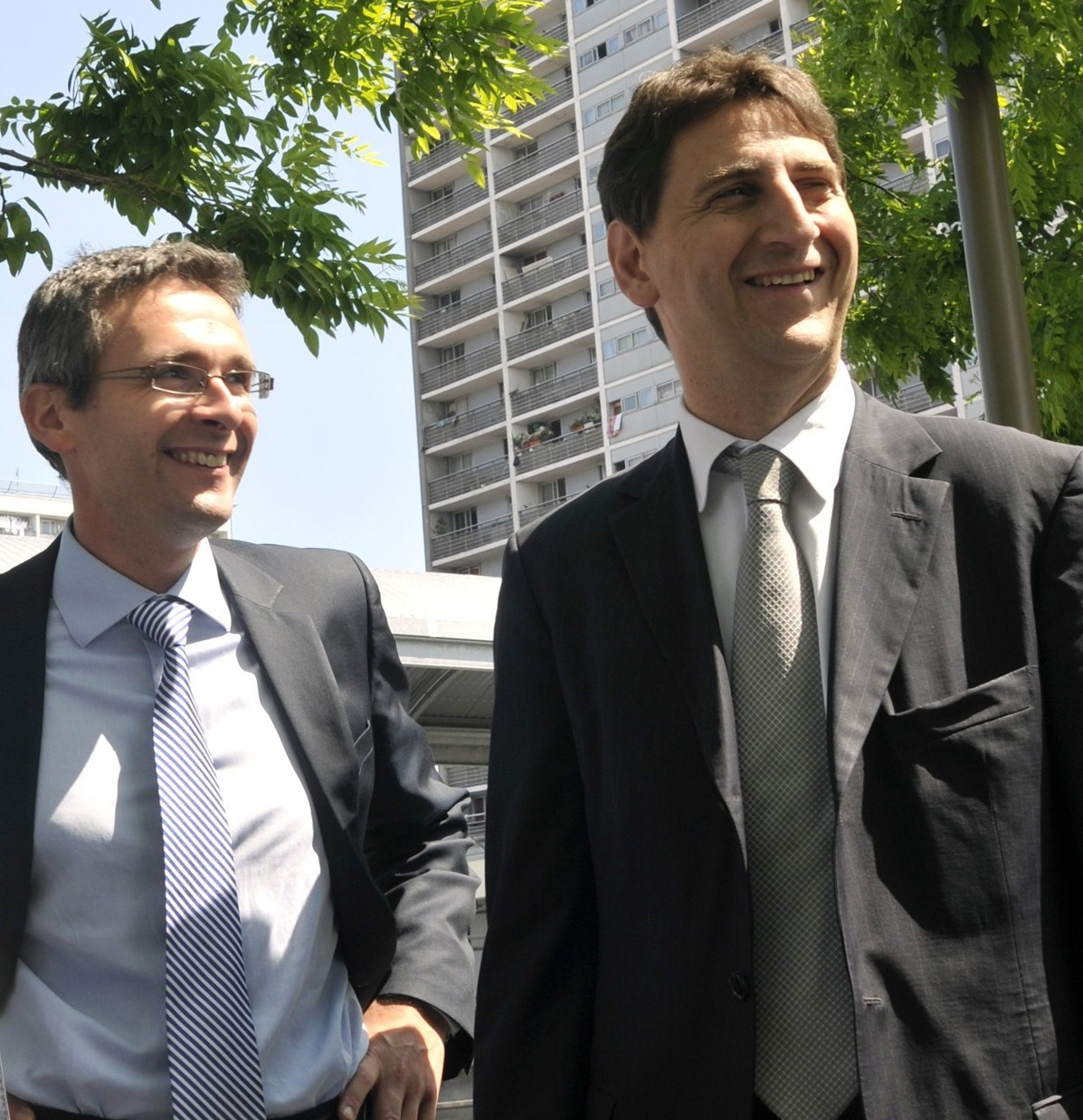 Visite cantonale a la courneuve 21-05-10051646